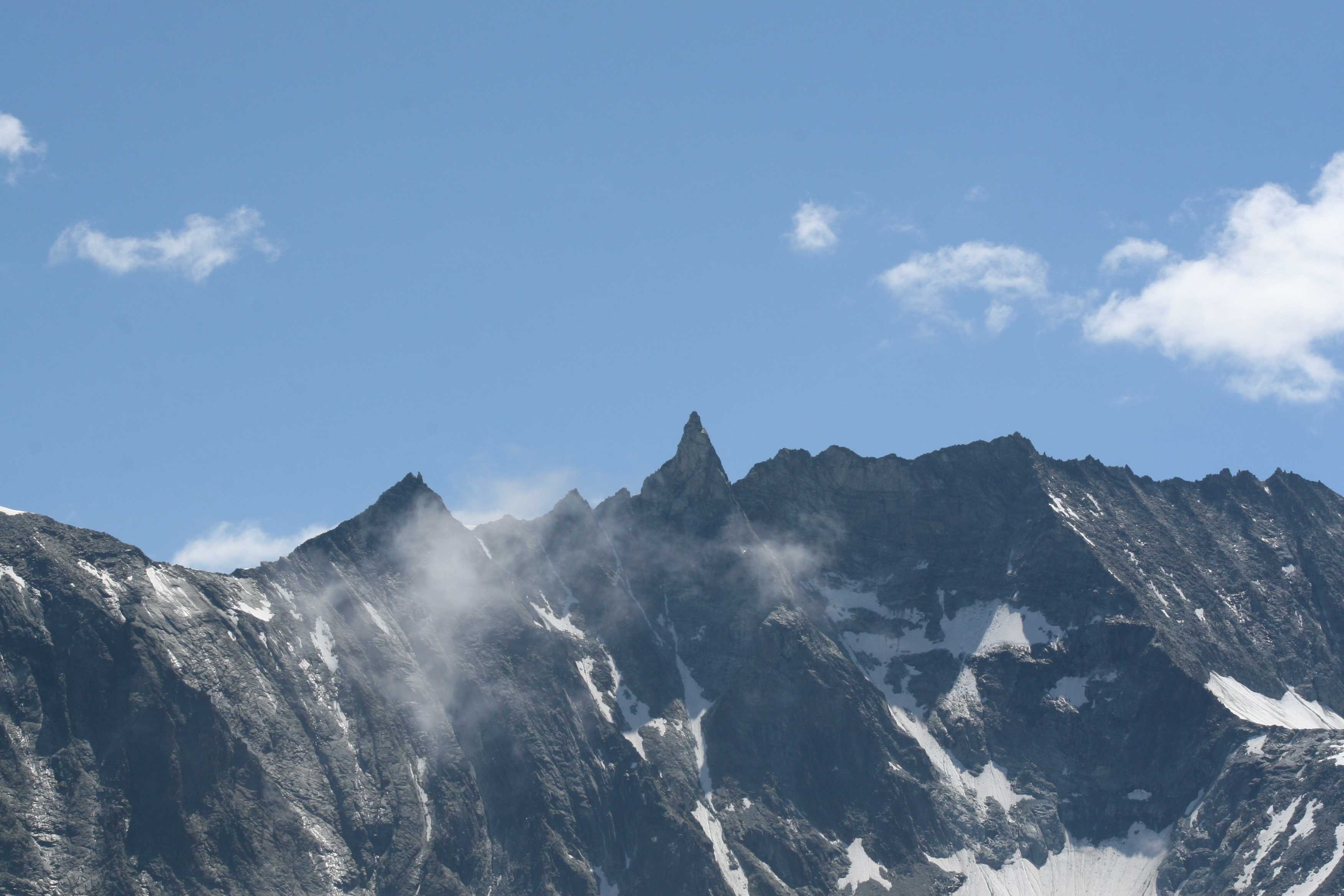 Aiguille de la Tza